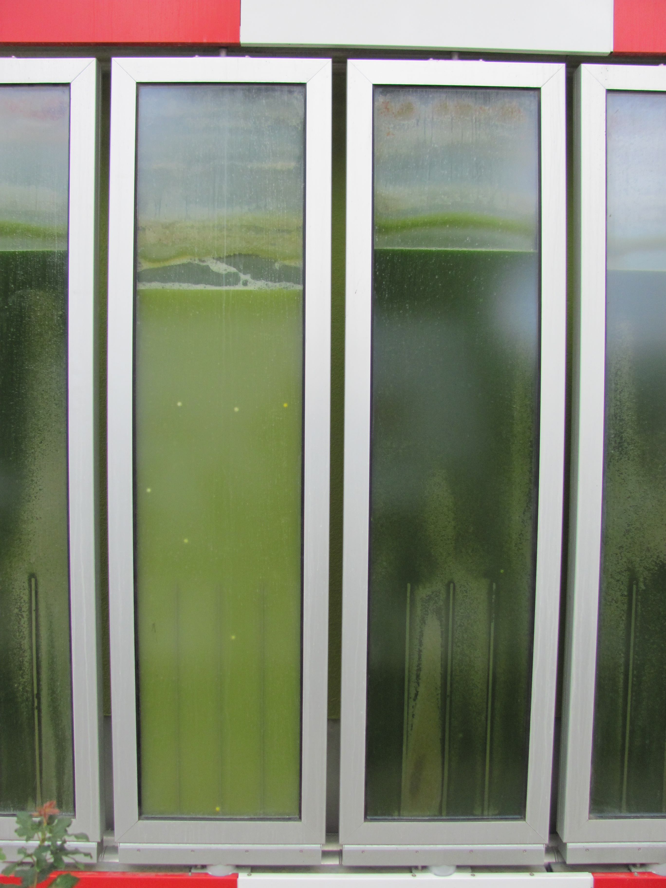 BIQ mit Bioreaktorfassade (Am Inselpark 17) auf der IBA Hamburg in Hamburg-Wilhelmsburg, Teil der Außenfassade mit Mikroalgenbehältern